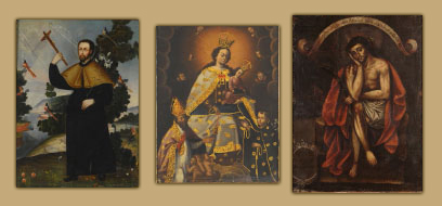 Pinturas de la época colonial chilena Casa del Arte Native namePinacoteca de la Universidad de Concepción Casa del Arte de la Universidad de Concepción Casa del Arte José Clemente OrozcoLocationConcepciónCoordinates36° 49′ 39″ S, 73° 02′ 20″ W Established1967 Web pagePinacoteca de la Universidad de ConcepciónAuthority control : Q5390424 institution QS:P195,Q5390424